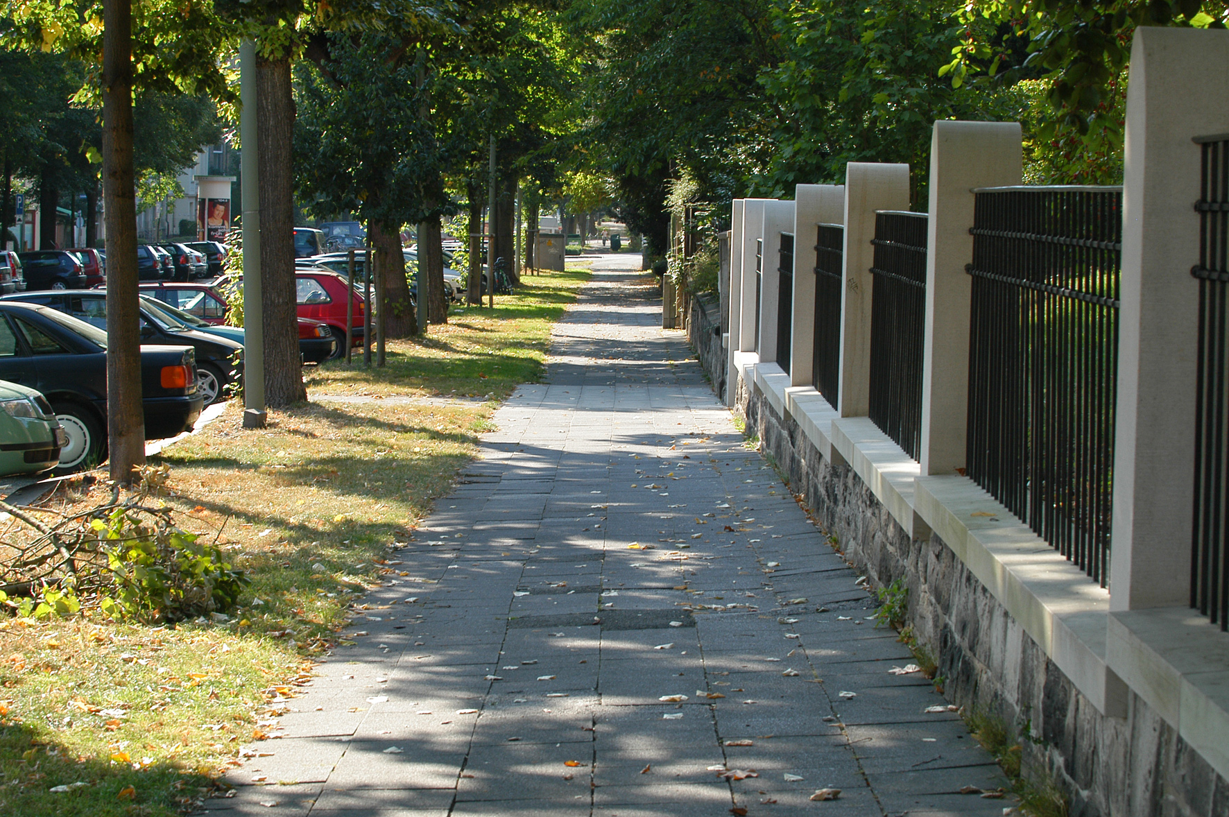 Gründerzeitlicher Gehweg